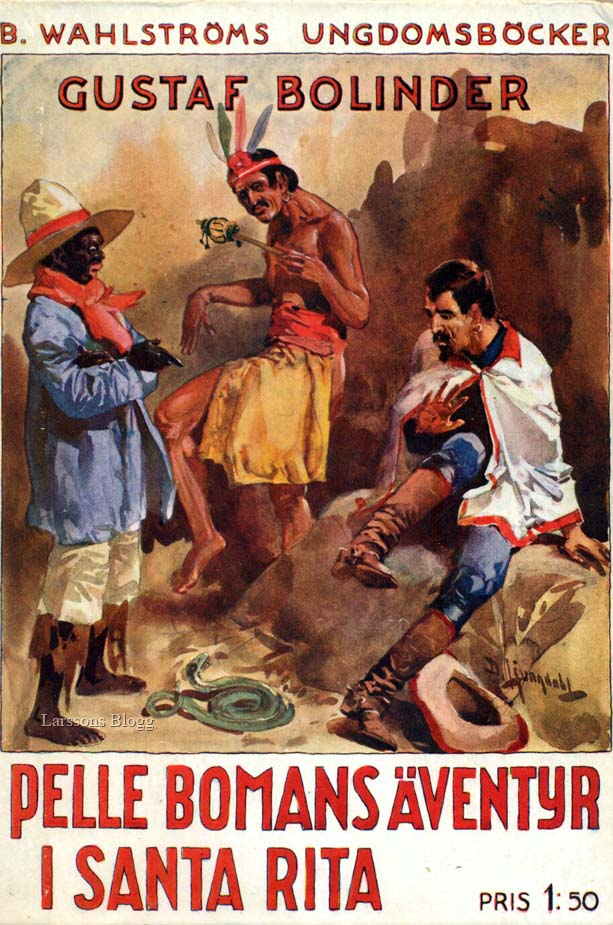 Book cover: Pelle Bomans äventyr i Santa Rita by Gustaf Bolinder